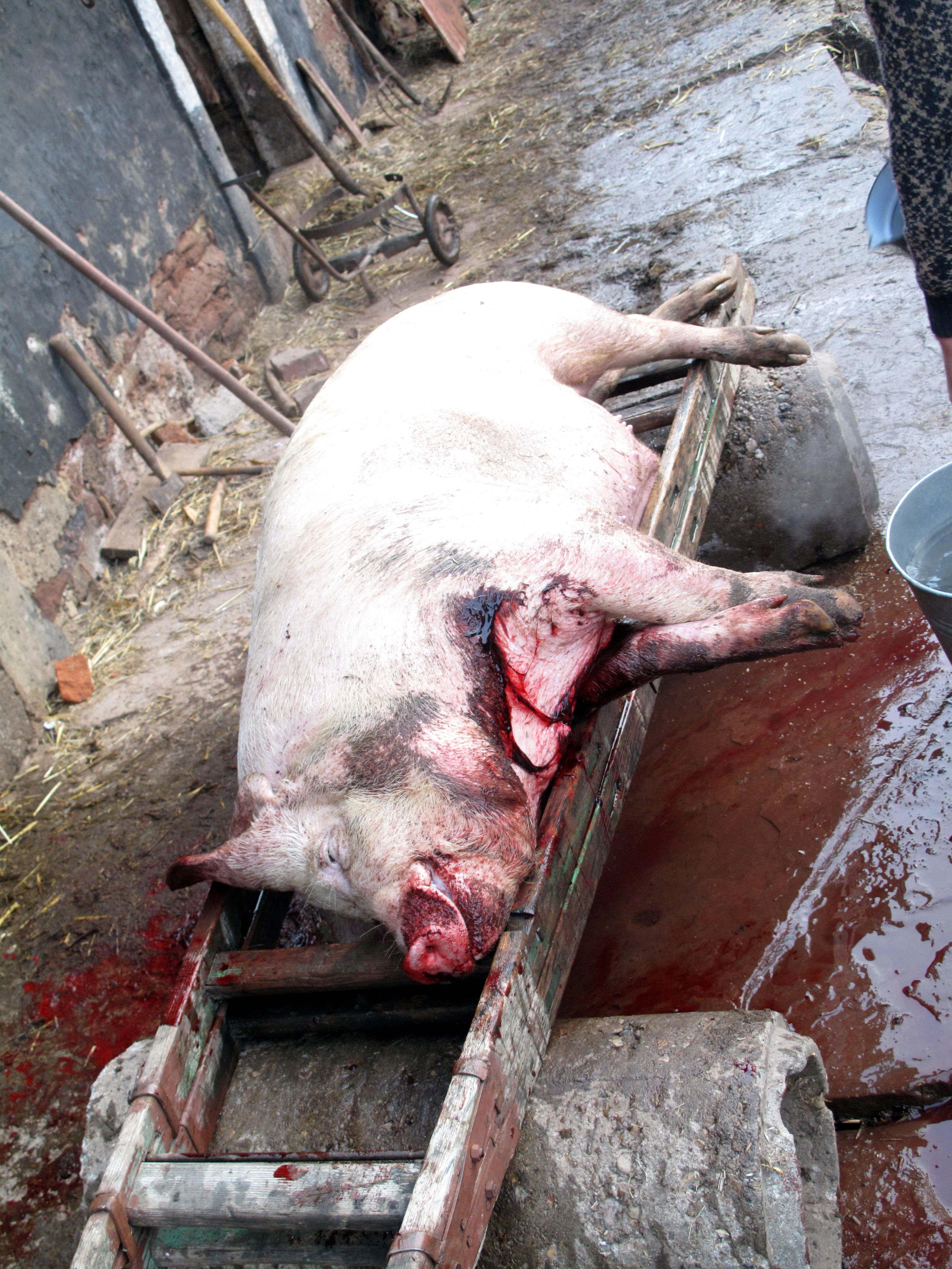 Prase na zabijačce